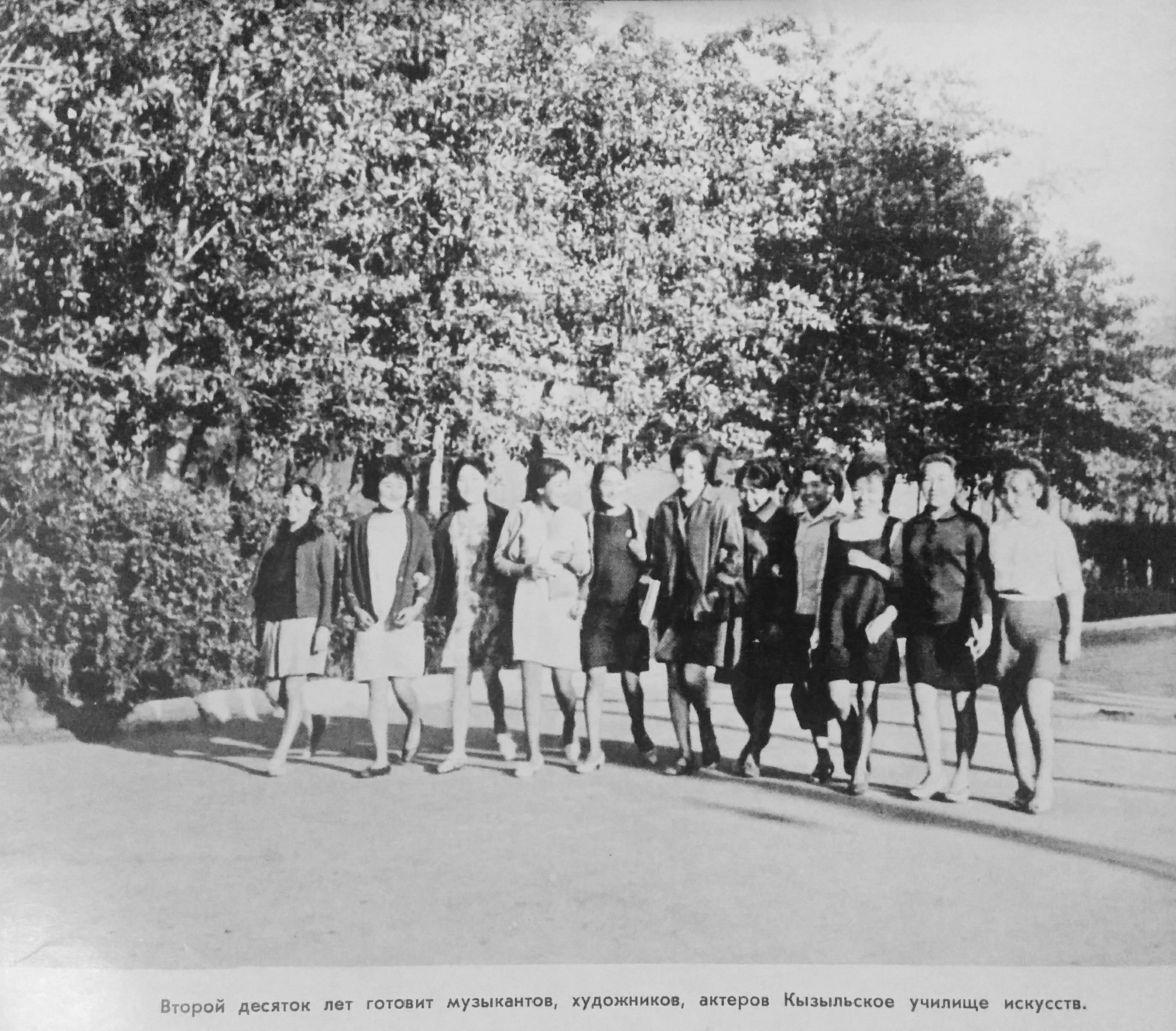 Студенты Кызылского училища искусств. 1973г. Фотография впервые была опубликована в фотоальбоме "Знакомьтесь: ТУВА". Издательство "Советская Россия". Москва - 1973 год. Авторы фотографий: Владимир Алексеев, Олег Гаврилов, Анатолий Остапчук.